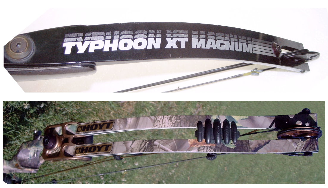 Wurfarme alt und neu Doppelt